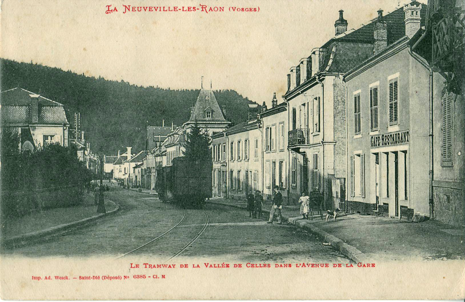 Carte postale ancienne éditée par Ad. Weick à Saint-Dié, n°6385 :LA NEUVEVILLE-LÈS-RAON - Le tramway de la Vallée de Celles dans l'avenue de la Gare